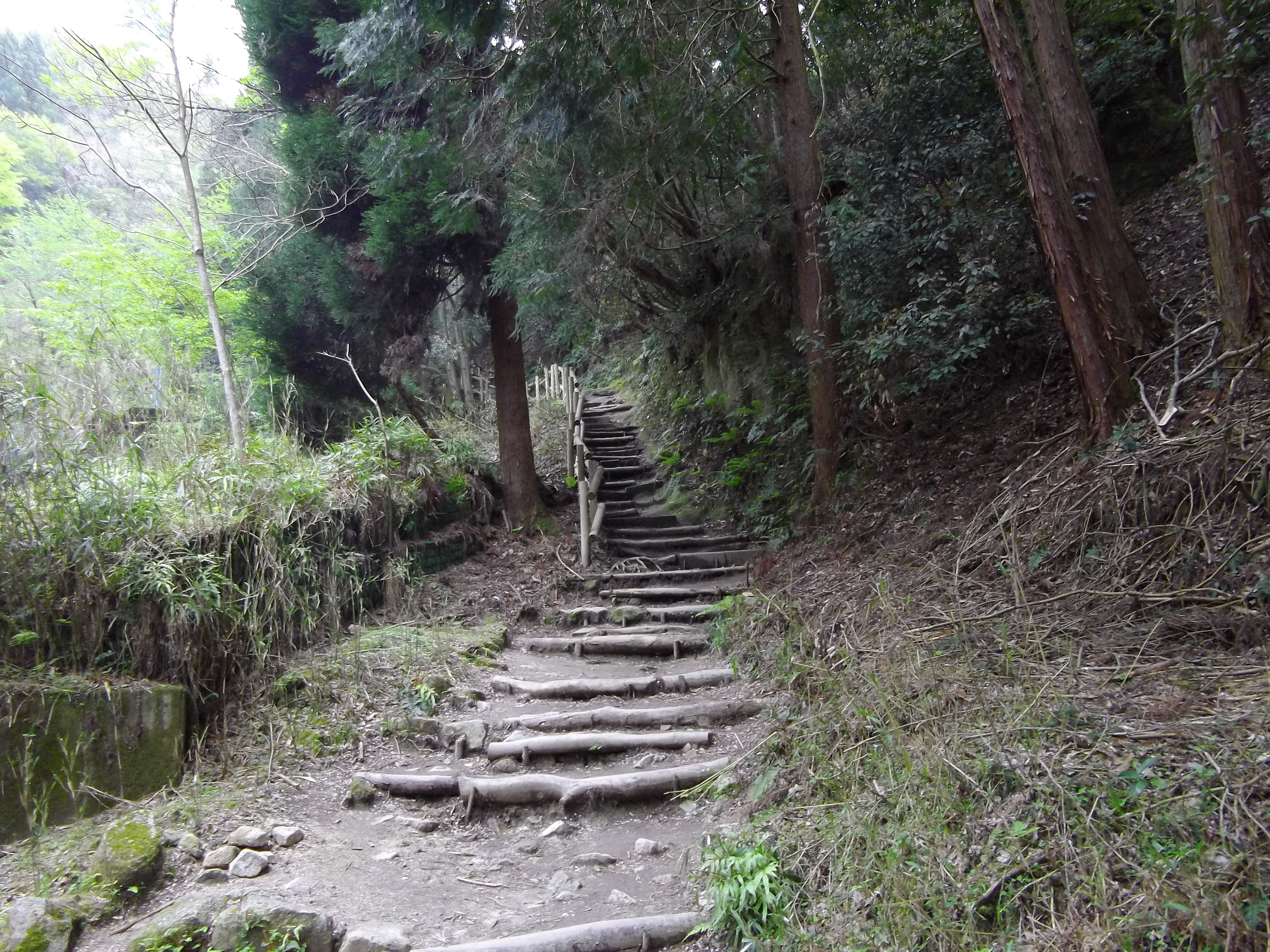 銀閣寺北からの大文字登山道。砂防ダム右手。この先柵を越えると旧道を太閤岩経由で石段下まで。越えずに道なりは新道で千人塚経由。